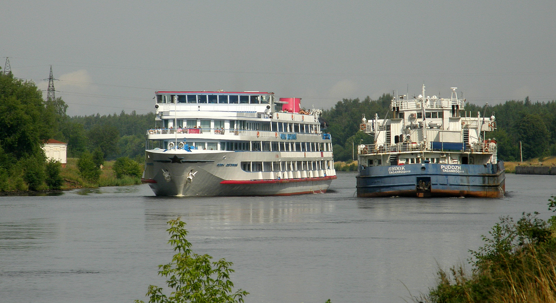 Запрудня. Канал им. Москвы. т/х "Пудож" и "Феликс Дзержинский"